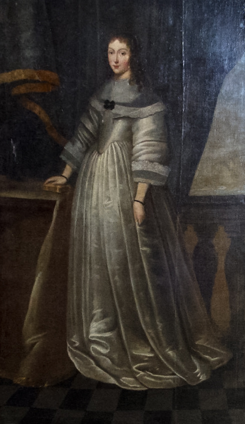 Portret Anny w kaplica nagrobnej Oświęcimów. Kaplica fundowana w 1647 przez Stanisława Oświęcima. Projekt architekta W. Petroniego i J.Ch. Falconiego. Pod kaplicą krypta Stanisława i Anny rodzeństwa Oświęcimów.